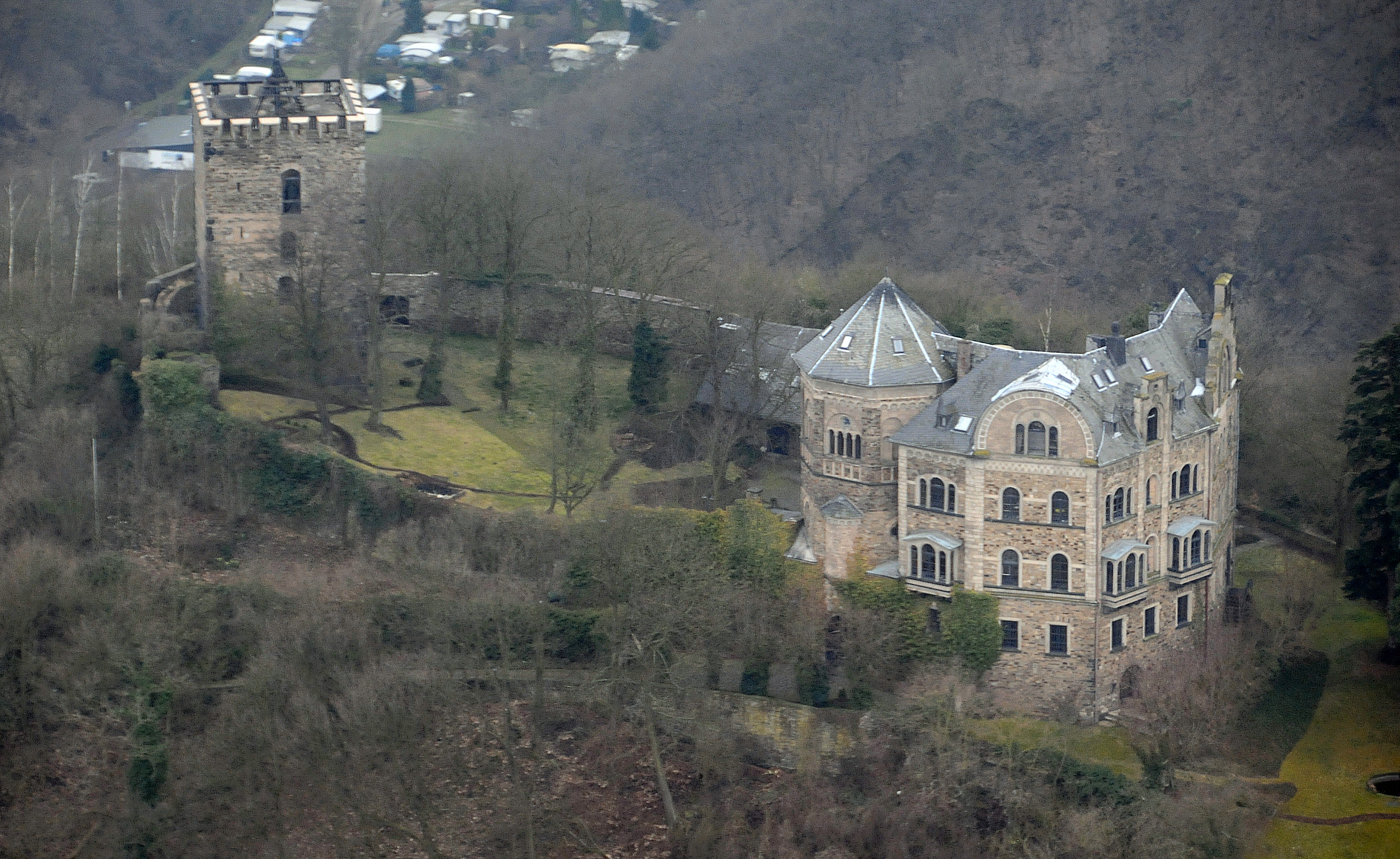 Luftbild der Burg Rheineck, Ansicht von Nordosten